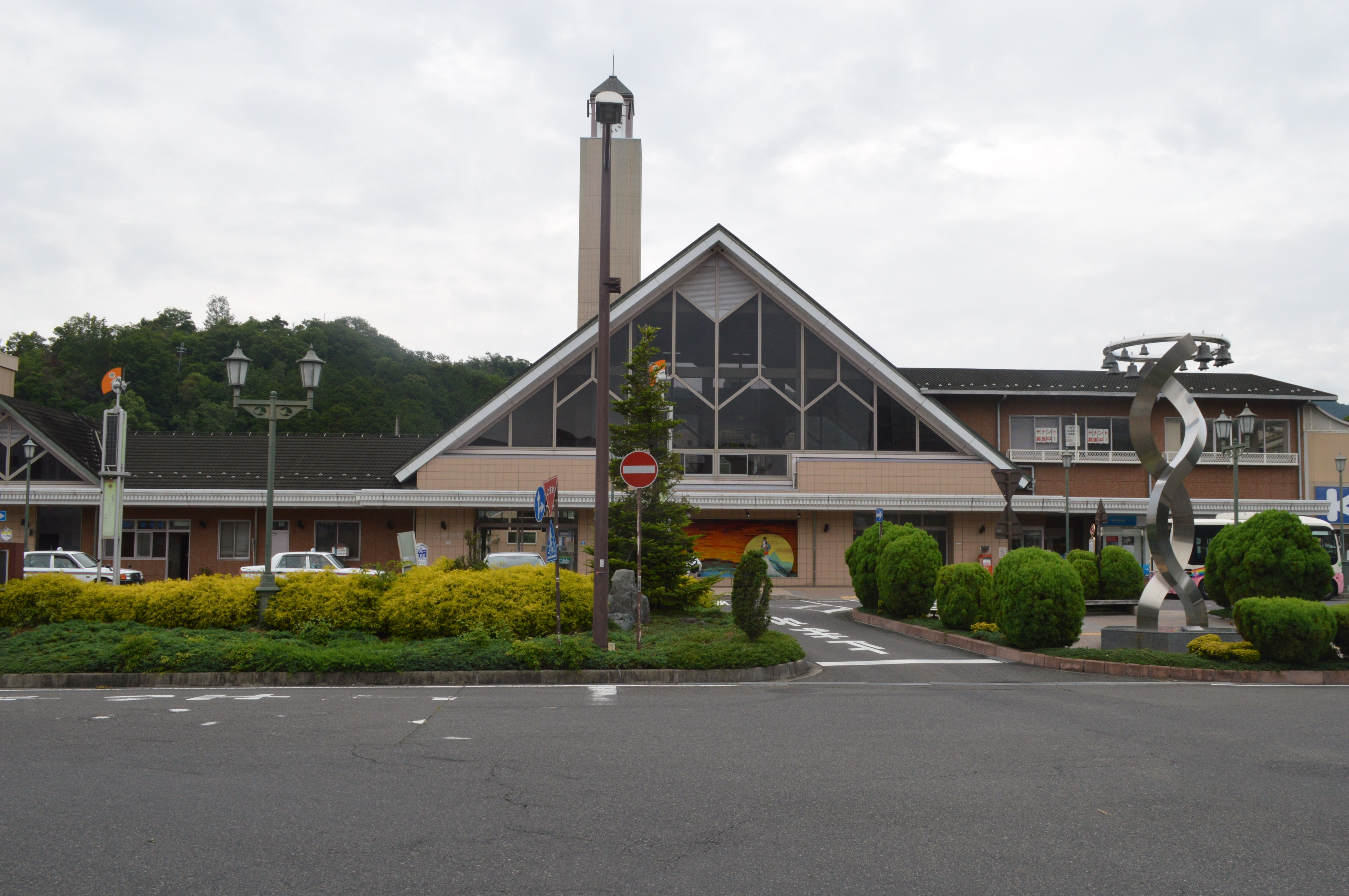 近江鉄道八日市駅